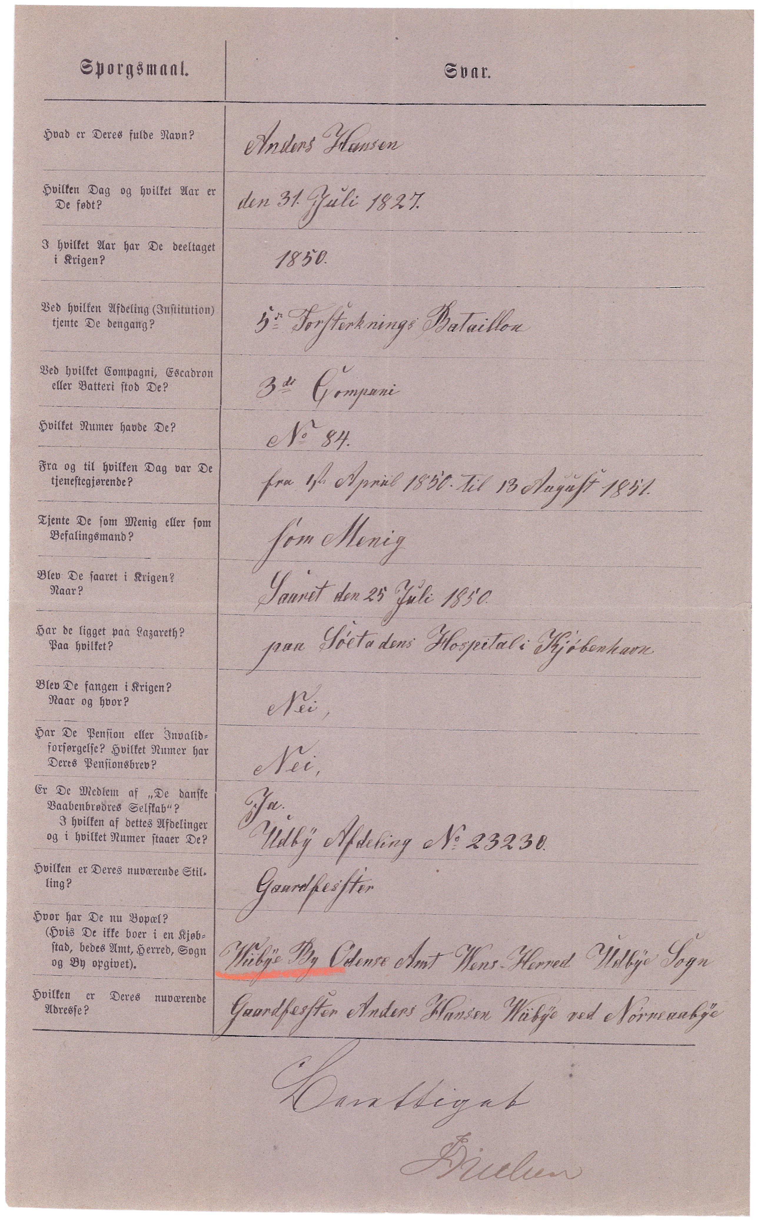 Rigsarkivet. Krigsministeriet. Ansøgninger om erindringsmedalje 1848-1850 1848-1943